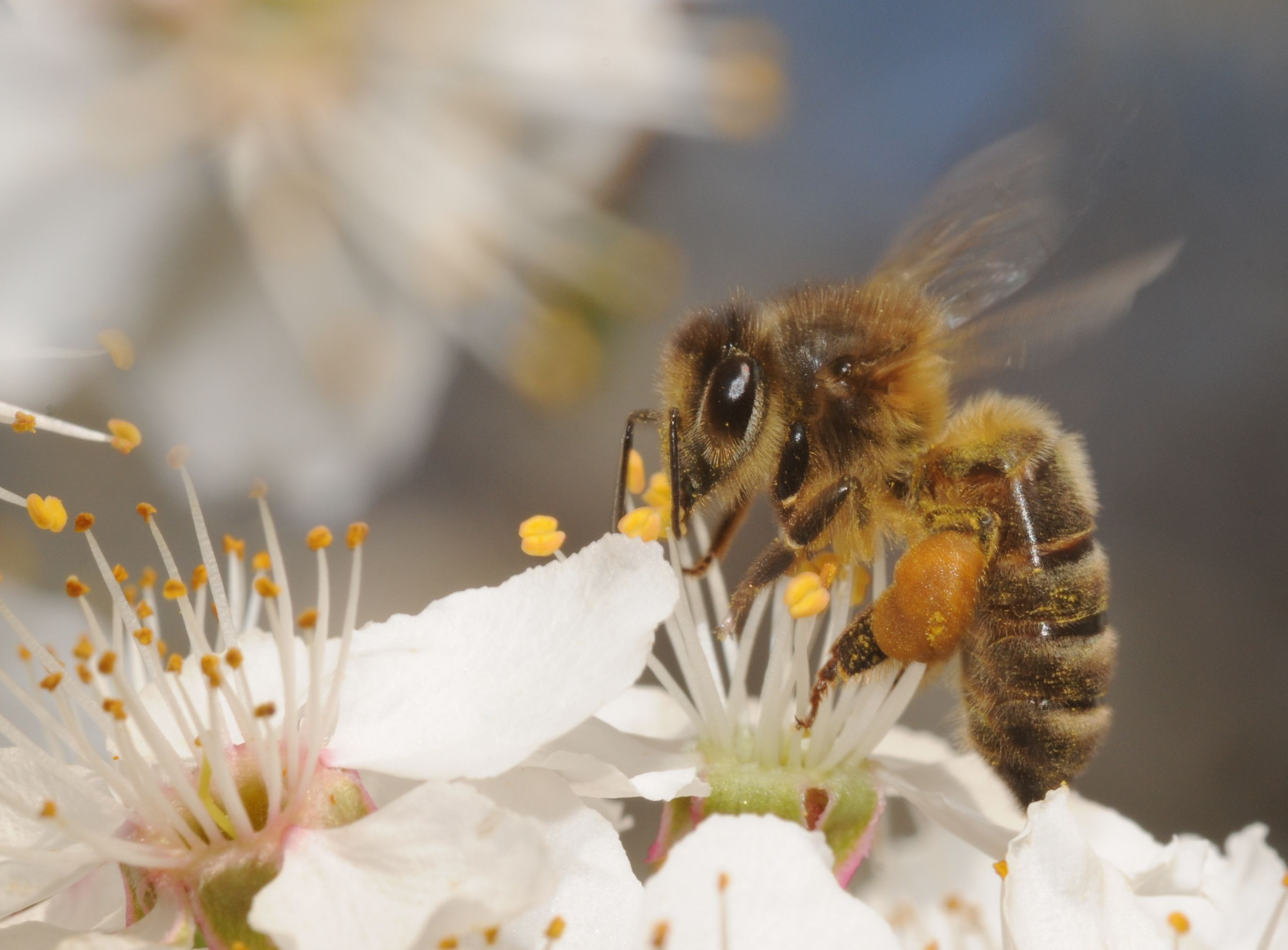 Abeille entrain de butiner